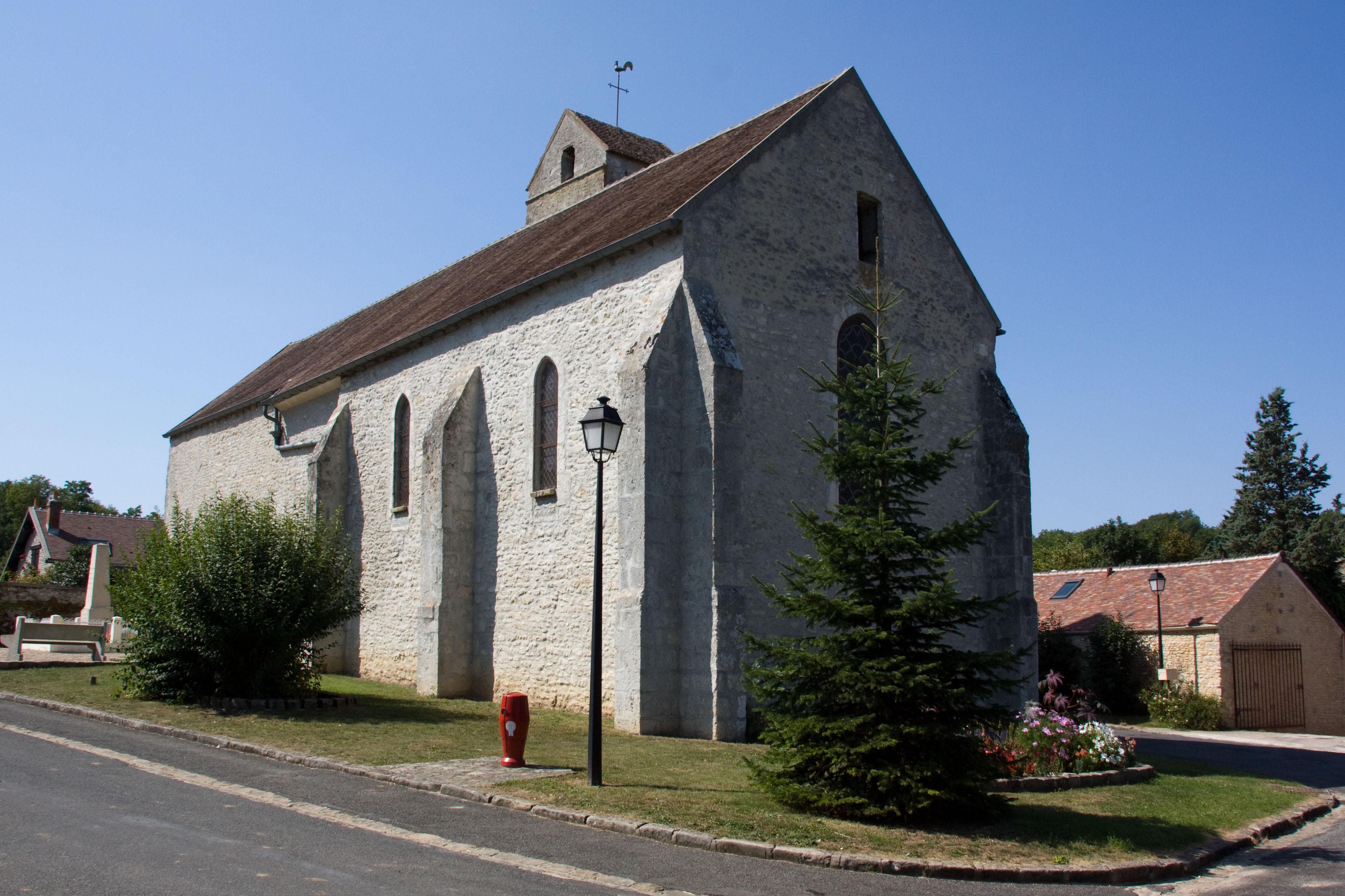 Elglise de Prunay-sur-Essonne, Prunay-sur-Essonne, Essonne, France